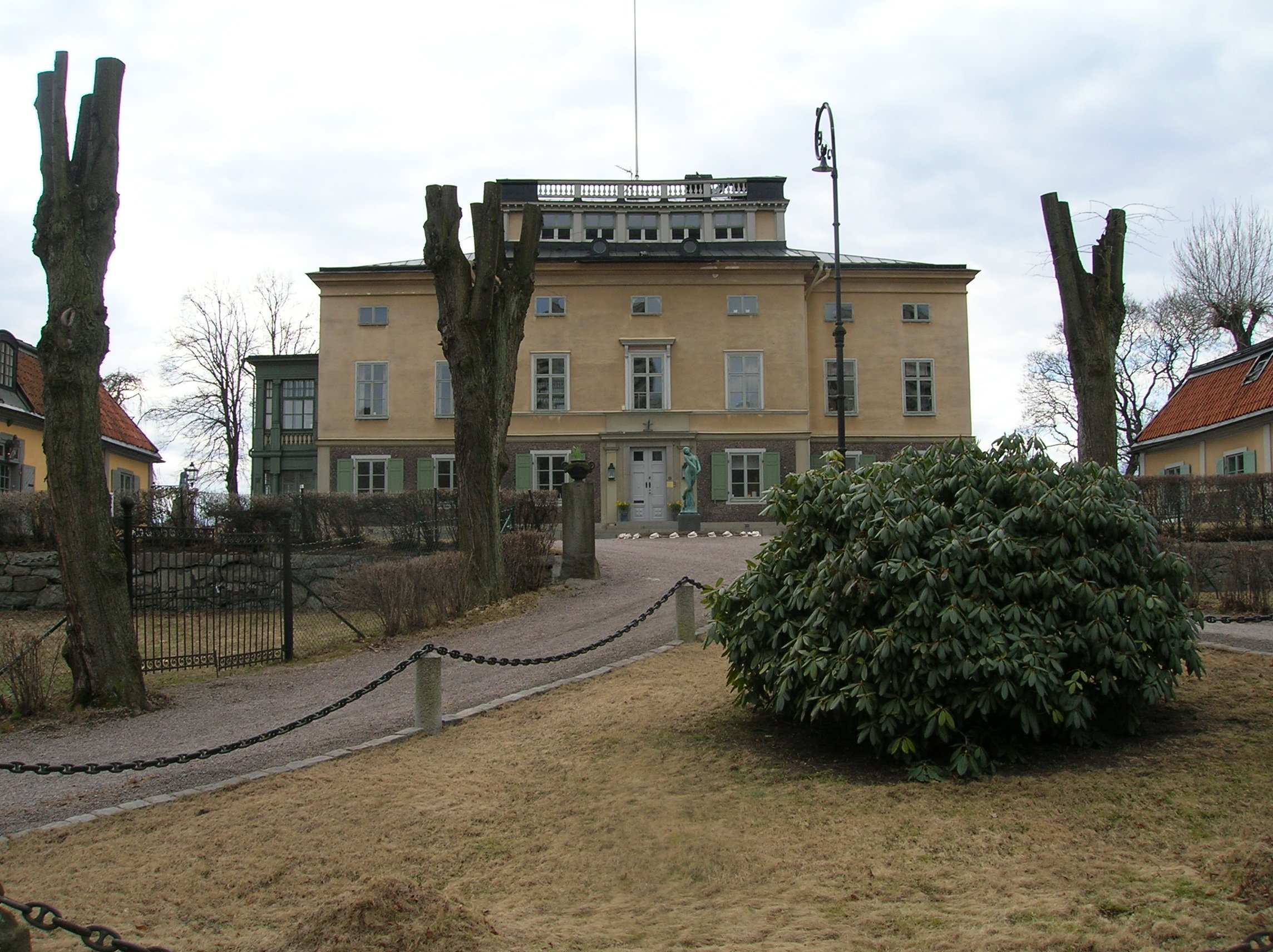 Huvudsta gård mansion, Solna Municipality, Stockholm County